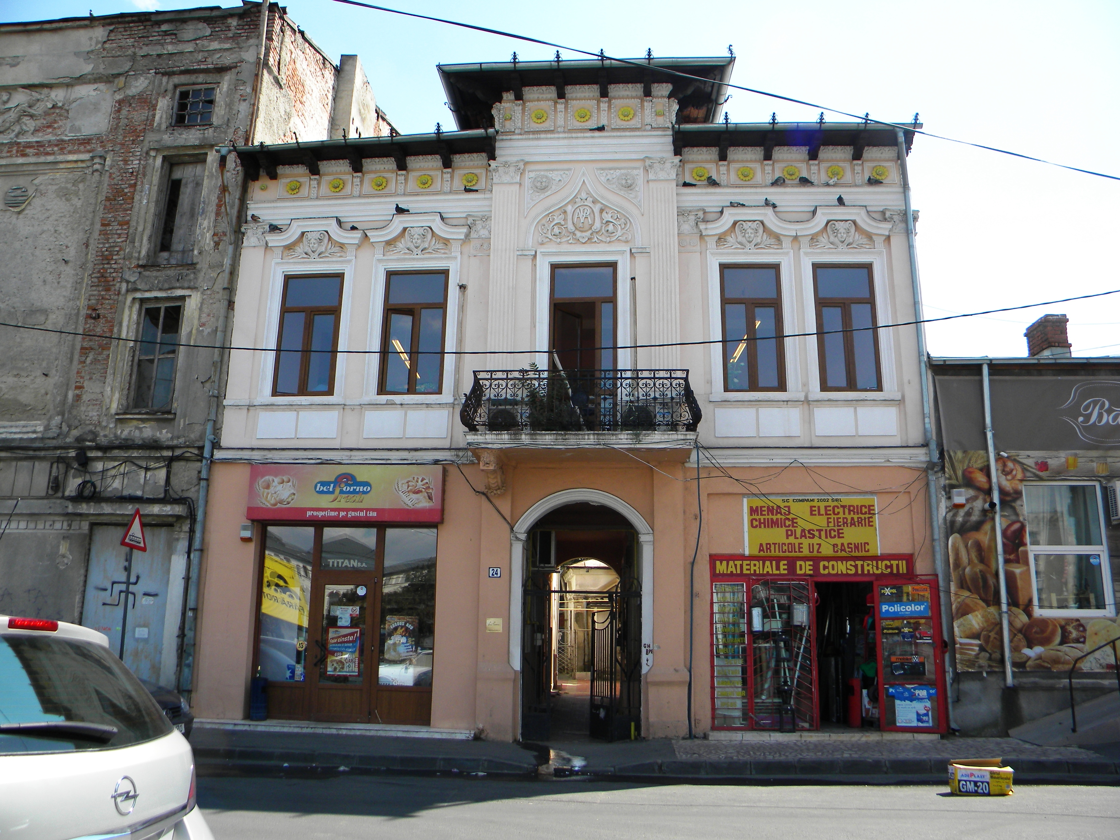 Bucuresti, Romania, Str. Atelierului nr. 24, sect. 1; B-II-m-B-18014 (1)